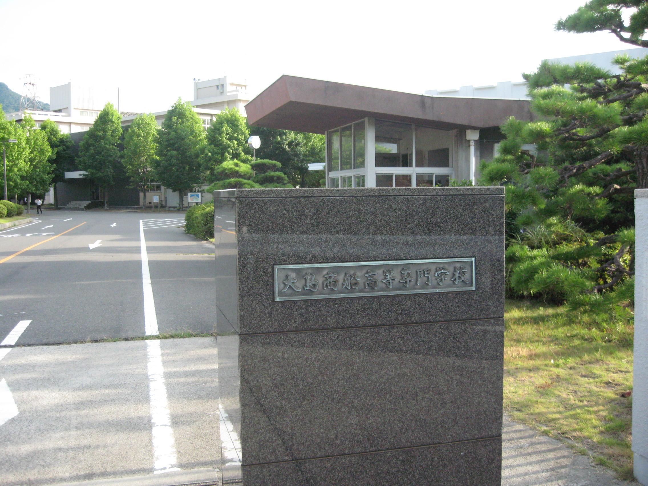 大島商船高等専門学校(立ち入り口）